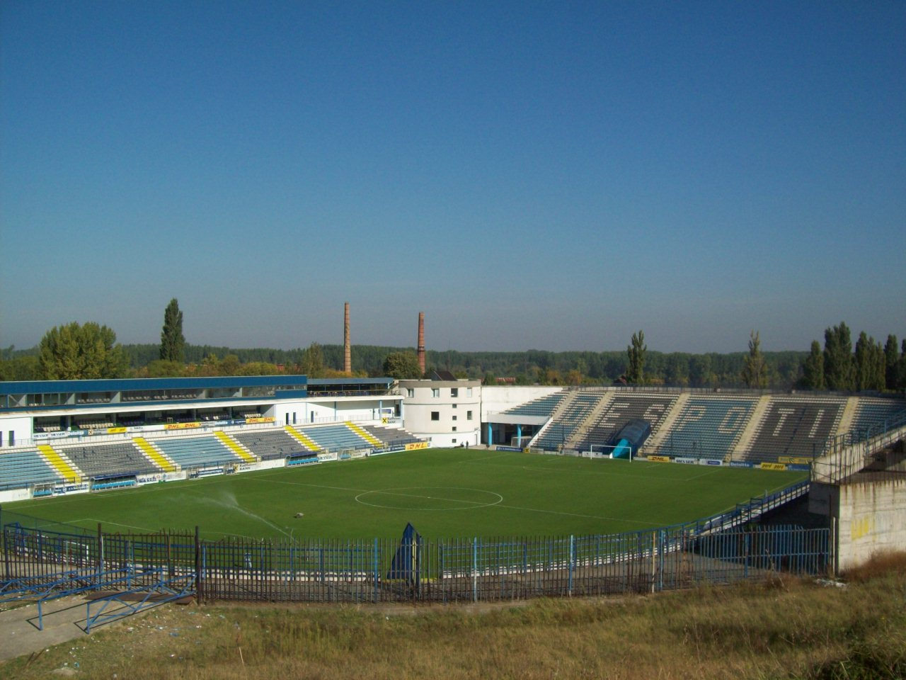 Stadion FK Smederevo